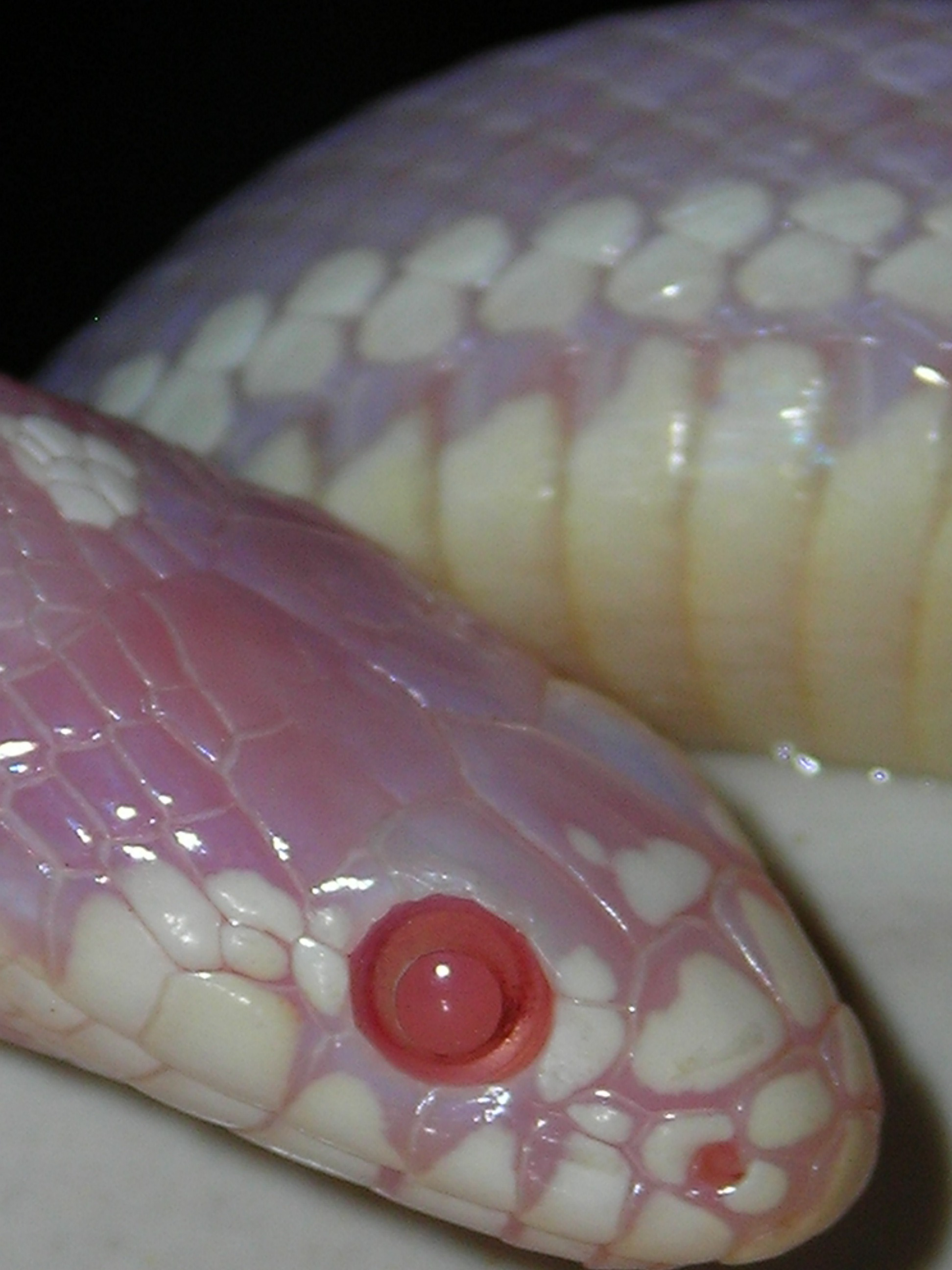 Lampropeltis californiae